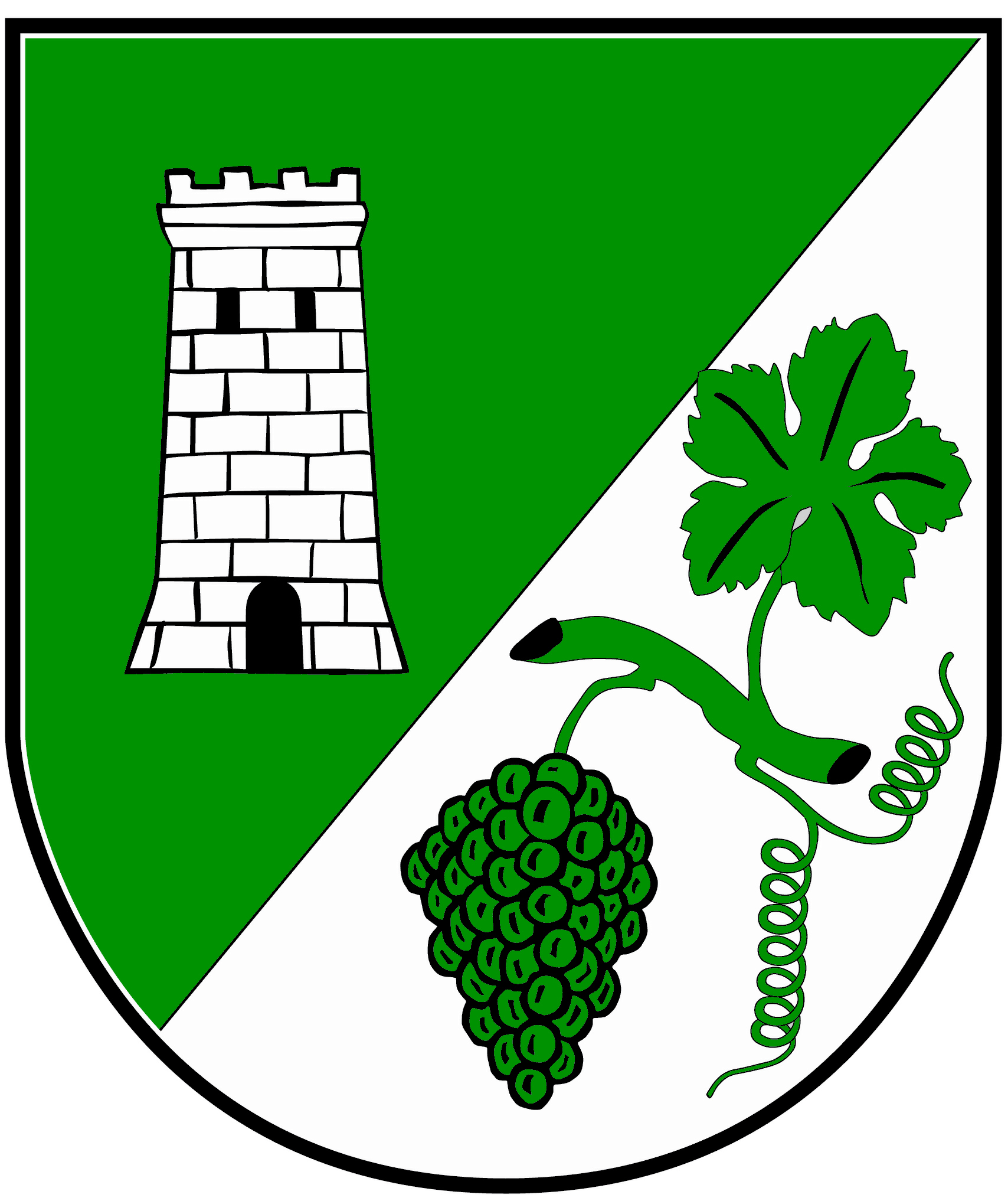 Wappen der Ortsgemeinde Serrig